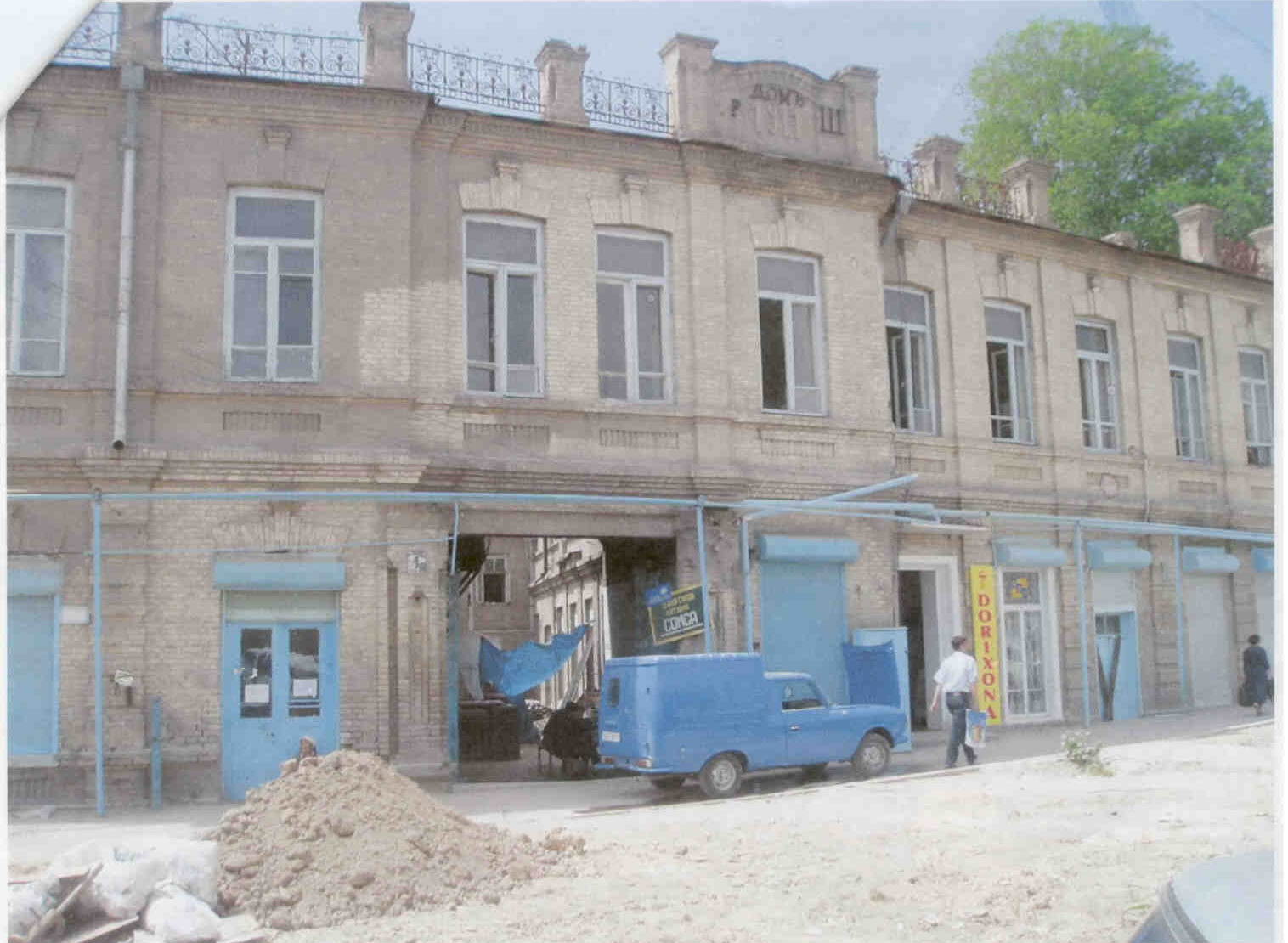 С 50-х годов данное здание использовалось как поликлиника